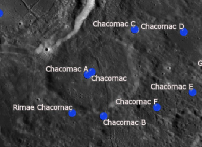 Cráter Chacornac LROC